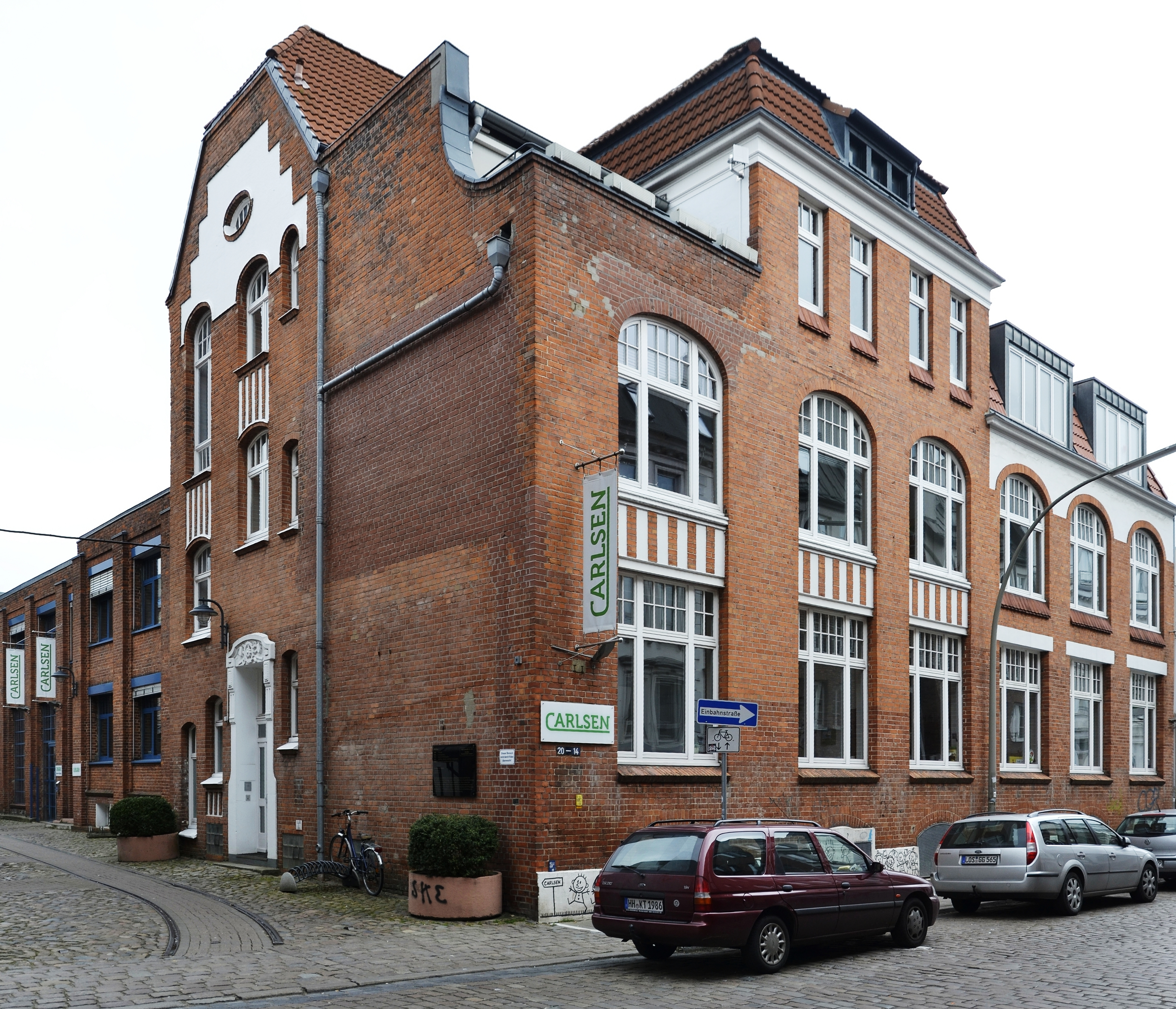 Das Verlagshaus des Carlsenverlages in Hamburg-Ottensen in der Völckersstraße 14-20.